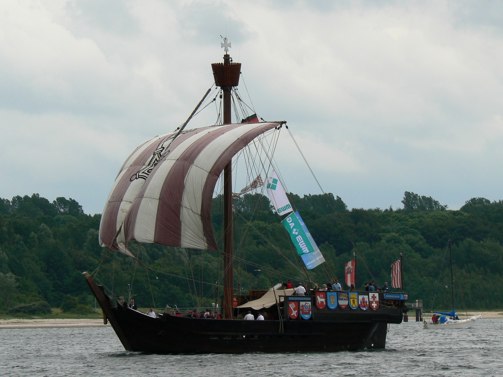 Segelschiff (Kogge) Ubena von Bremen auf der Kieler Woche 2007. Die Kogge ist ein Nachbau der 1962 gefundenen Bremer Hansekogge. Bauzeit: 1988-91.